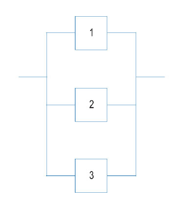 Diagrama de sistema paralelo